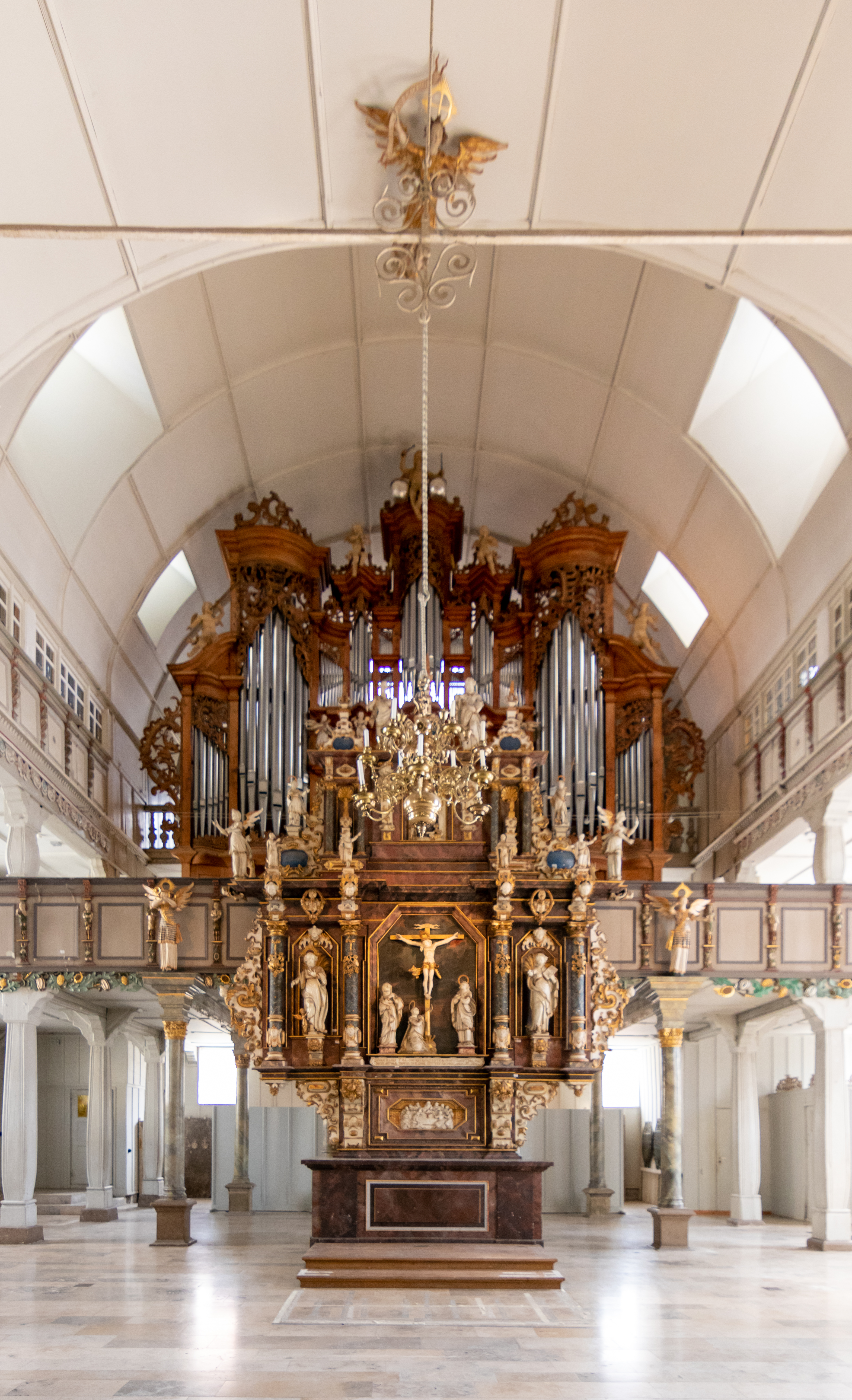 Die evangelisch-lutherische Marktkirche zum Heiligen Geist ist die historische Hauptkirche im Ortsteil Clausthal der Bergstadt Clausthal-Zellerfeld. Sie ist die größte Holzkirche Deutschlands und gehört durch ihre Architektur und Ausstattung zu den bedeutendsten Baudenkmälern des norddeutschen Barocks. Blick in den Innenraum